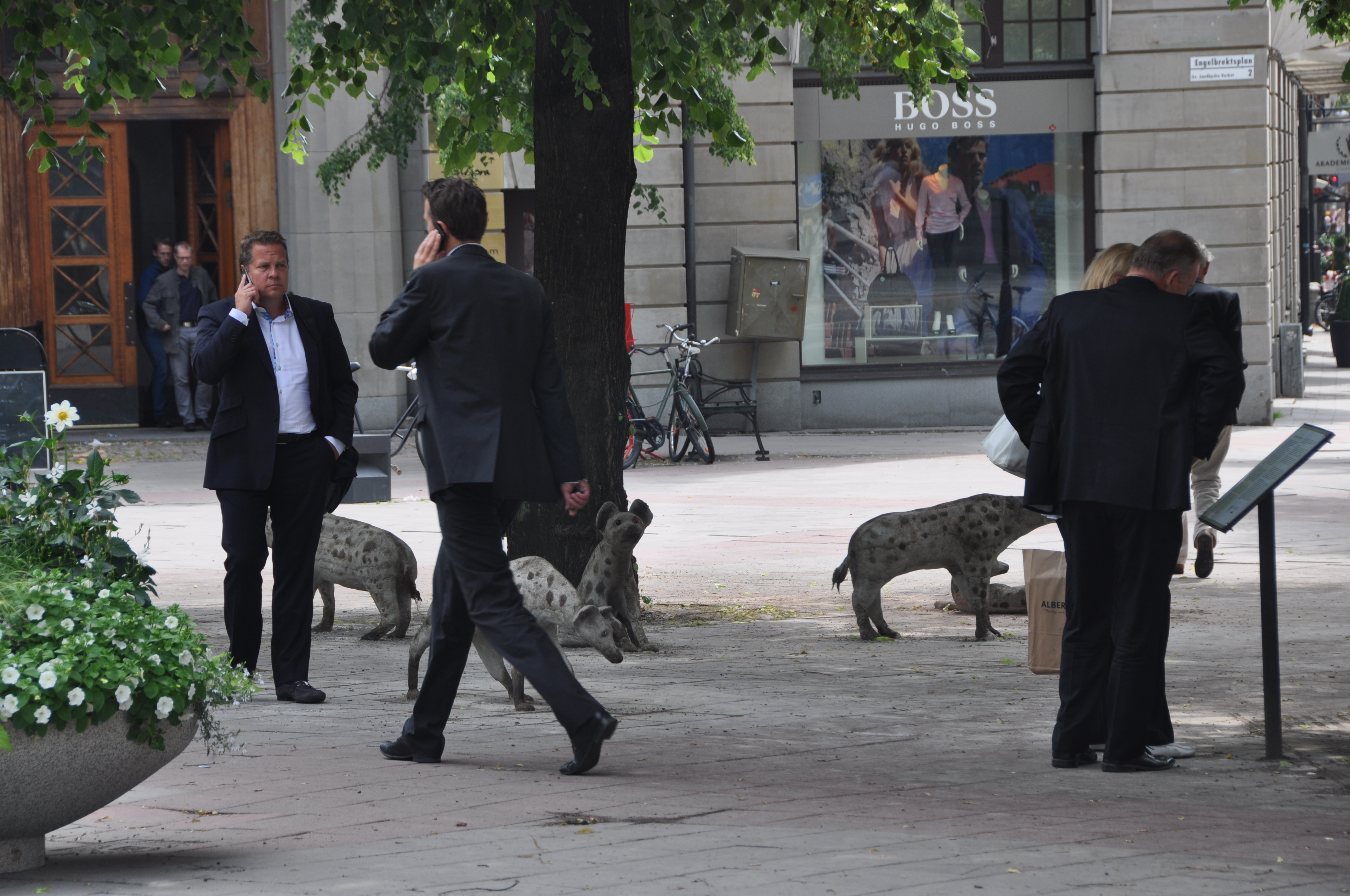 Hyenorna vid Stureplan. Gatukonst utplacerad vid Engelbrektsplan, Stockholm av olabo